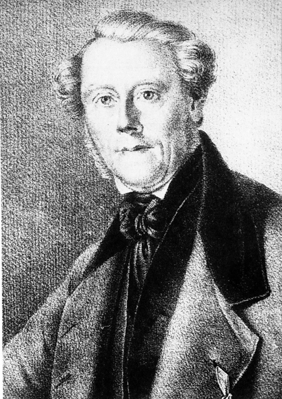 Lithographie (Ausschnitt) Christian Prinz (1801-1849)